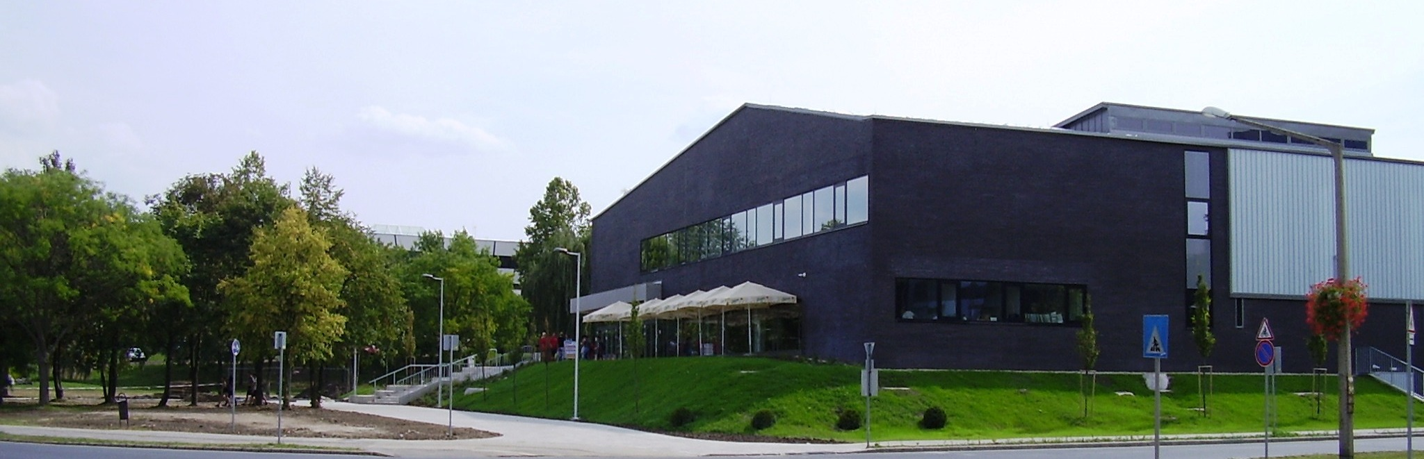 A Don Bosco Sportközpont épülete Kazincbarcikán.